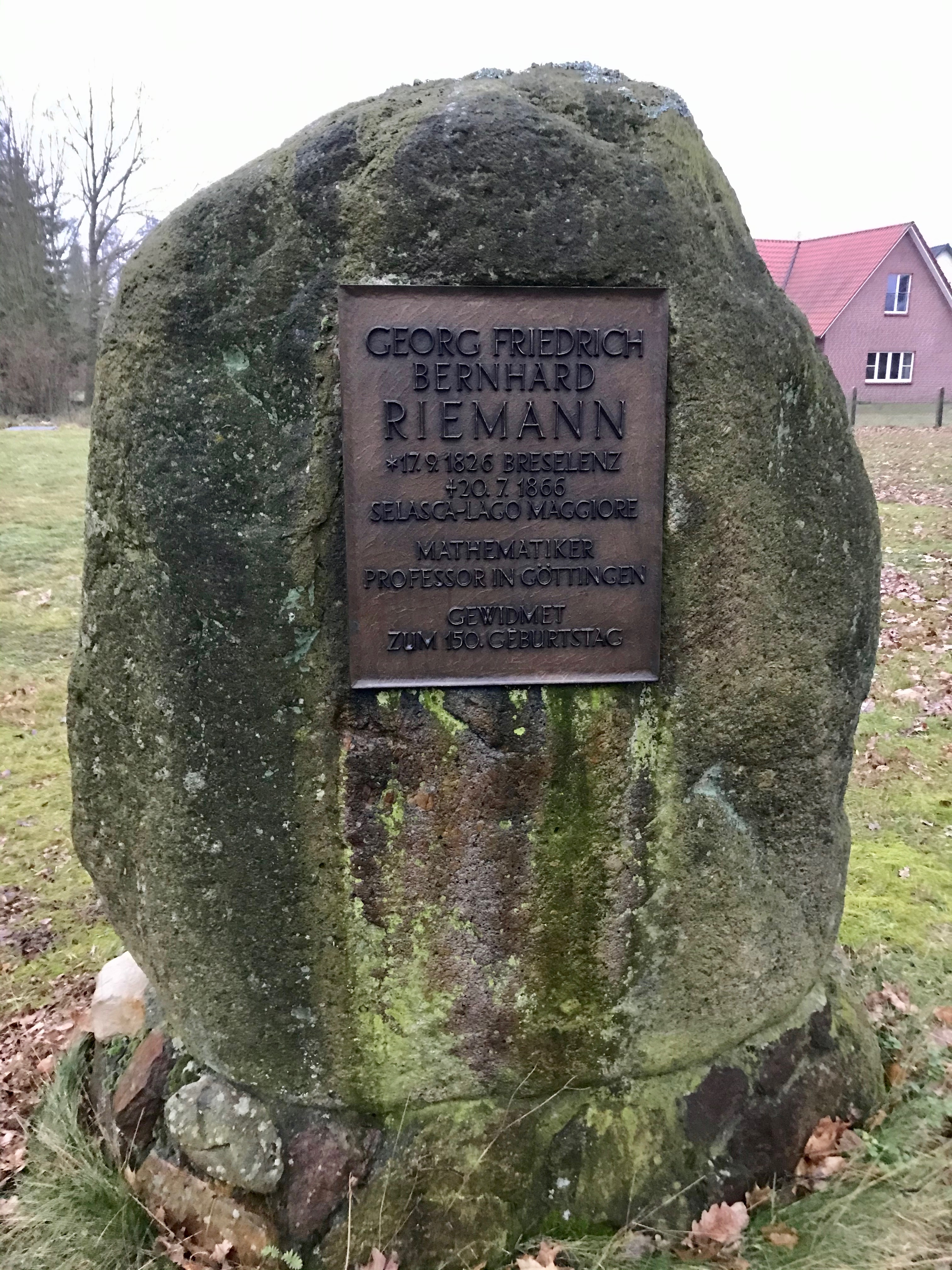 Ein Denkmal an Herrn Riemann.